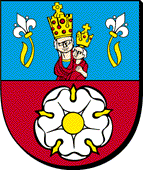 Herb gminy Gidle